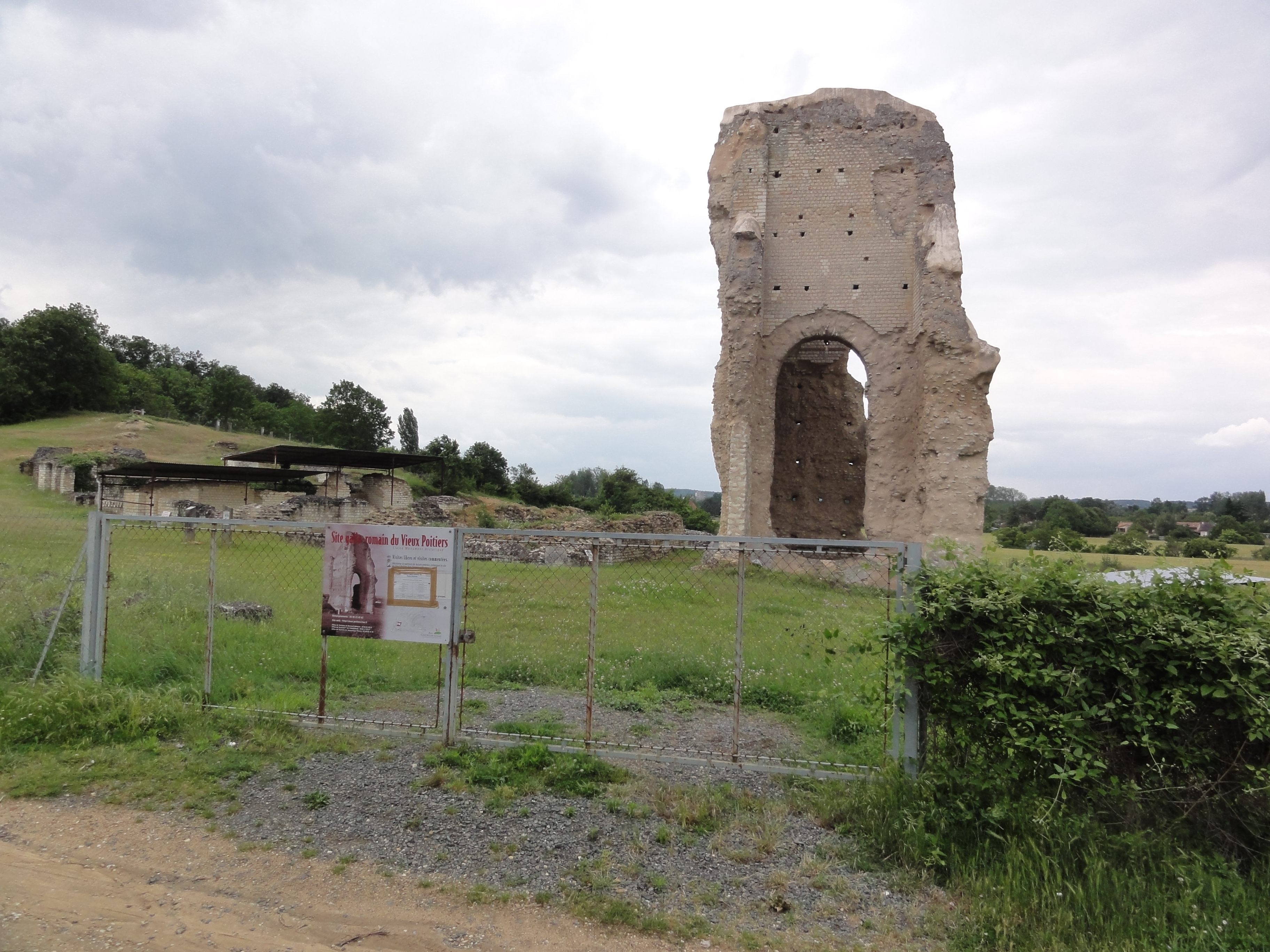 Site archéologique du Vieux Poitiers, à cheval sur Naintré et Cenon-sur-Vienne .